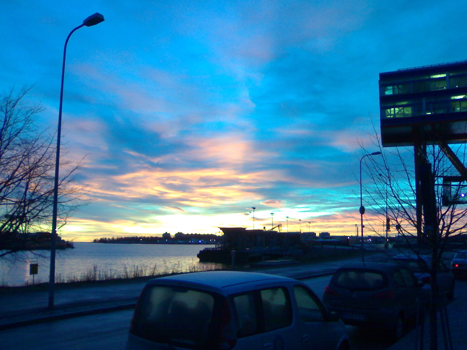 Le ciel à Lauttasaari, en Finlande.